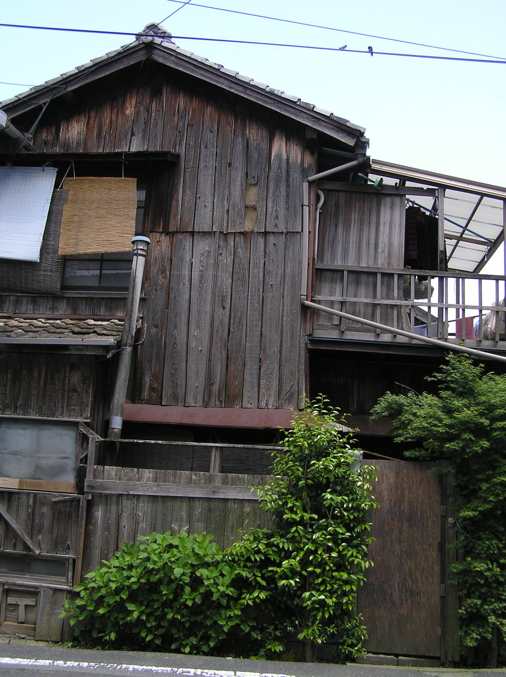 まるで李さん一家の一軒家のような民家。 【おぉたむすねィく探検隊】 ～photo by Autumn Snake